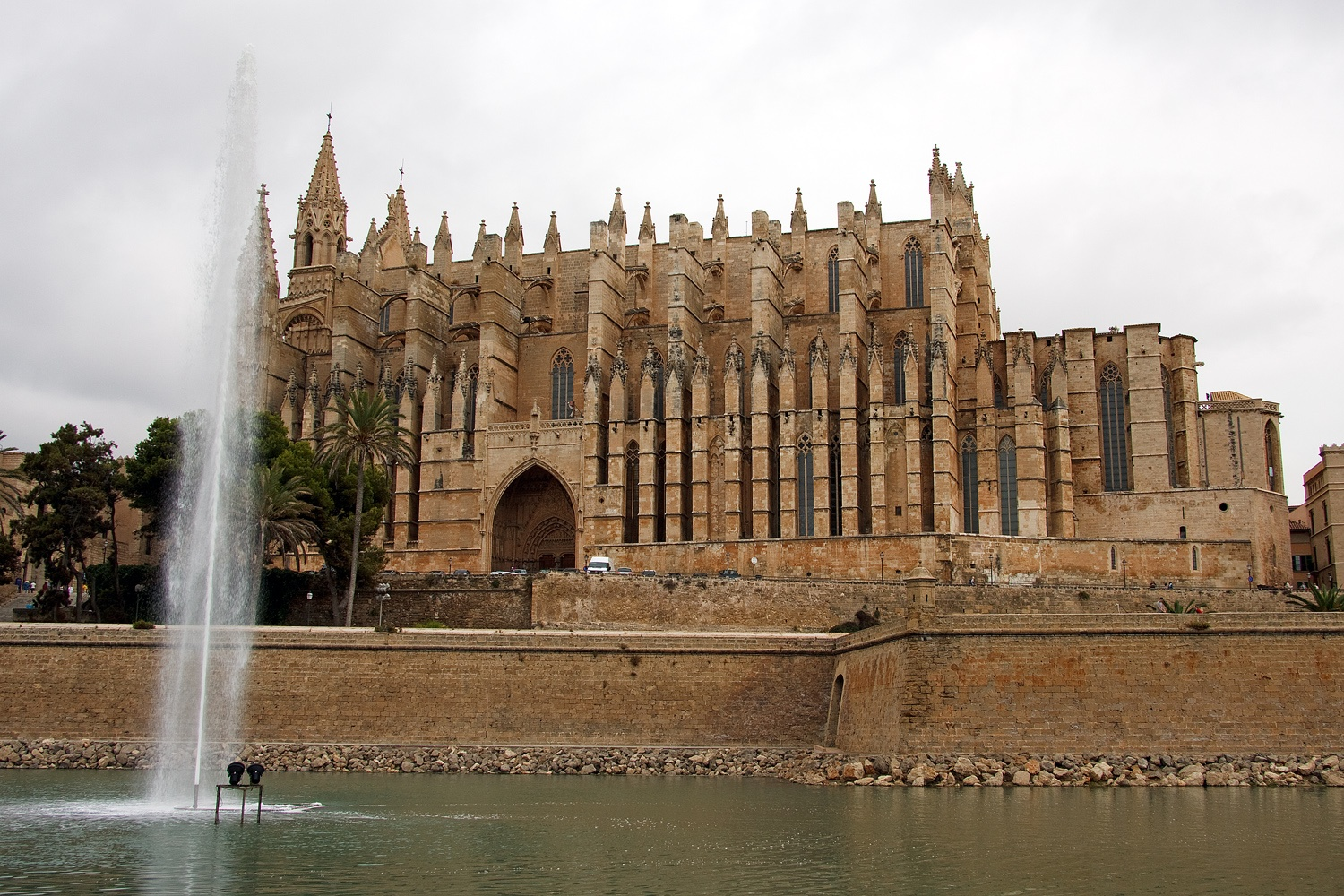 Kathedralkirche der Heiligen Maria, Datum/Uhrzeit: 23.09.2010 11:08:57